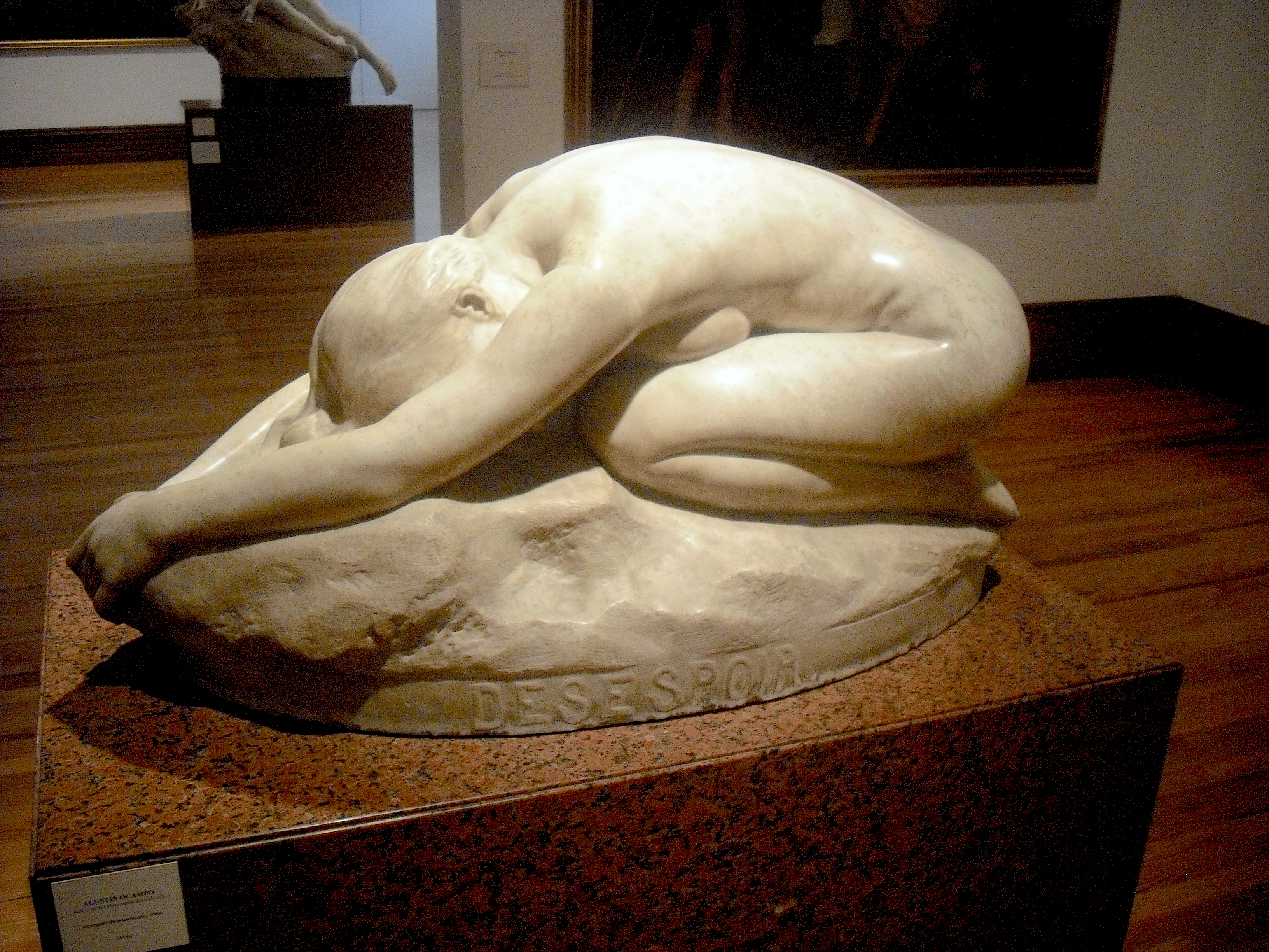 Desespoir (Agustín Ocampo), en el Museo Nacional de Arte